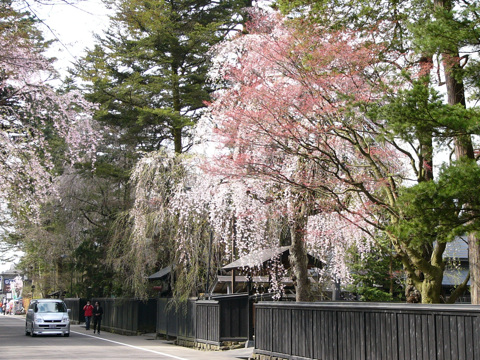 みちのくの小京都、仙北市角館町の武家屋敷通り（重要伝統的建造物群保存地区）のシダレザクラ（国の天然記念物）です。